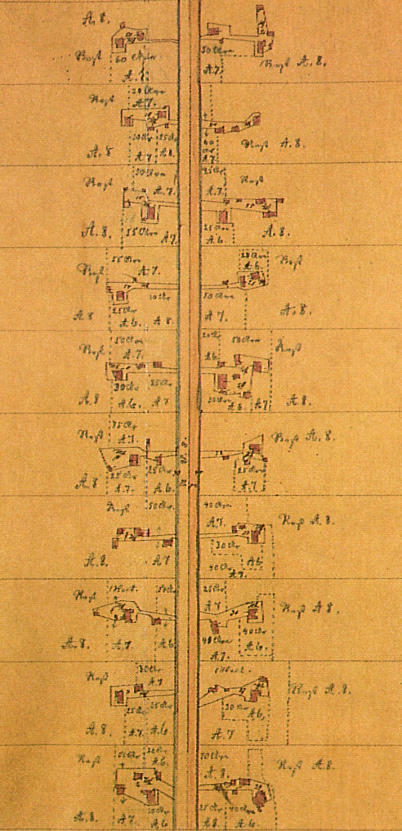 Neudorf-Platendorf 1872